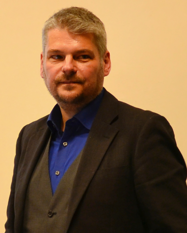 Vortrag zum Hortfund von Rülzheim durch Ulrich Himmelmann, Generaldirektion Kulturelles Erbe Rheinland-Pfalz, Landesarchäologie, im Niedersächsischen Landesamt für Denkmalpflege